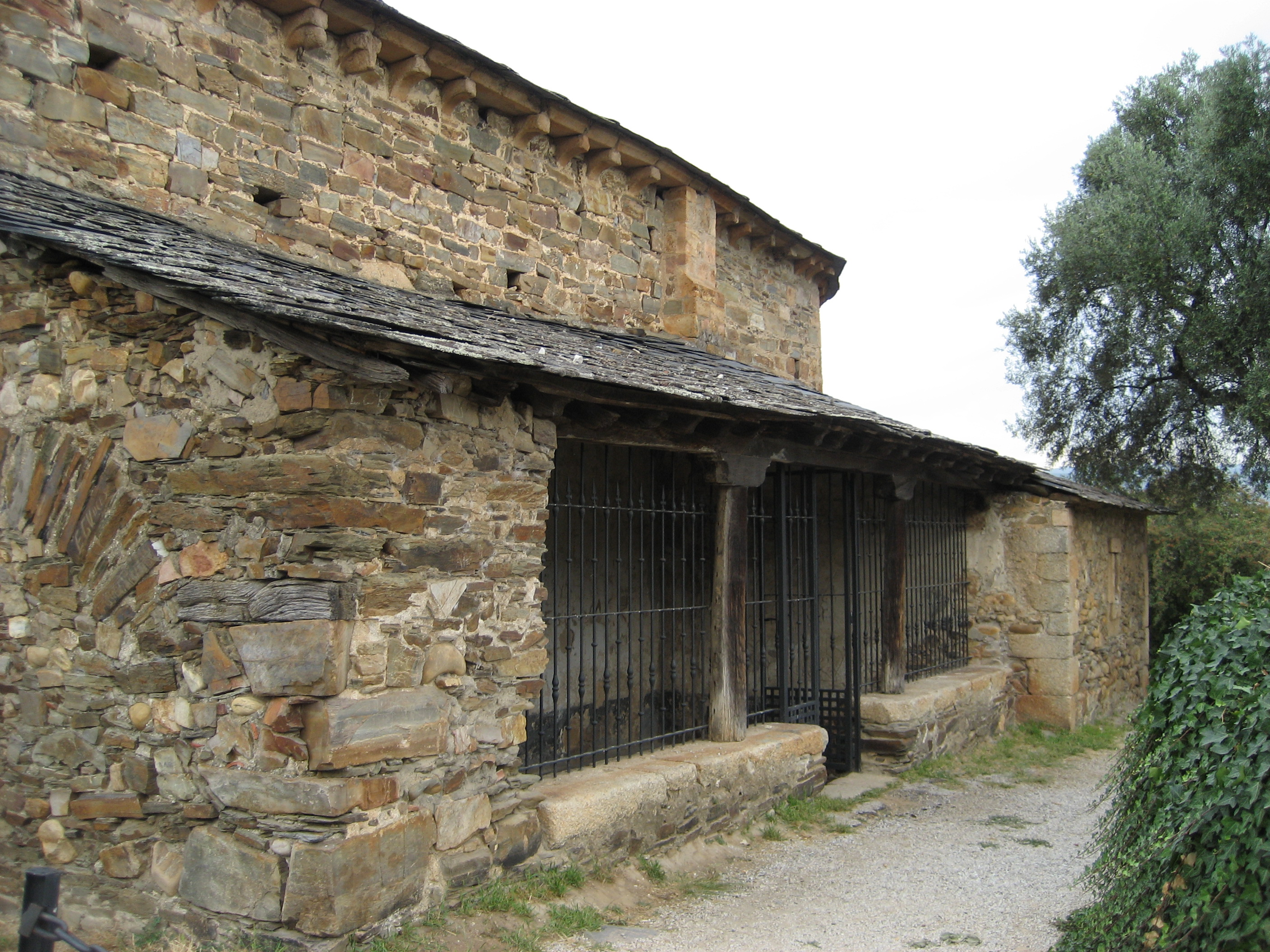 Iglesia de Santa María de Vizbayo situada en la localidad de Otero de Ponferrada en El Bierzo, León, España